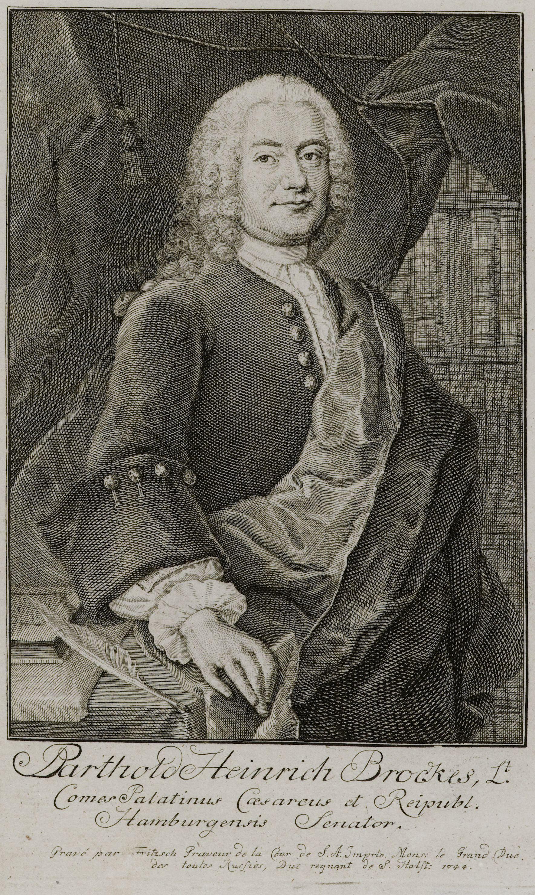 Barthold Heinrich Brockes